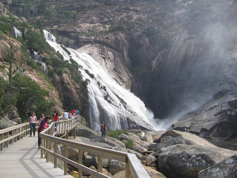 Fervenza do Ézaro